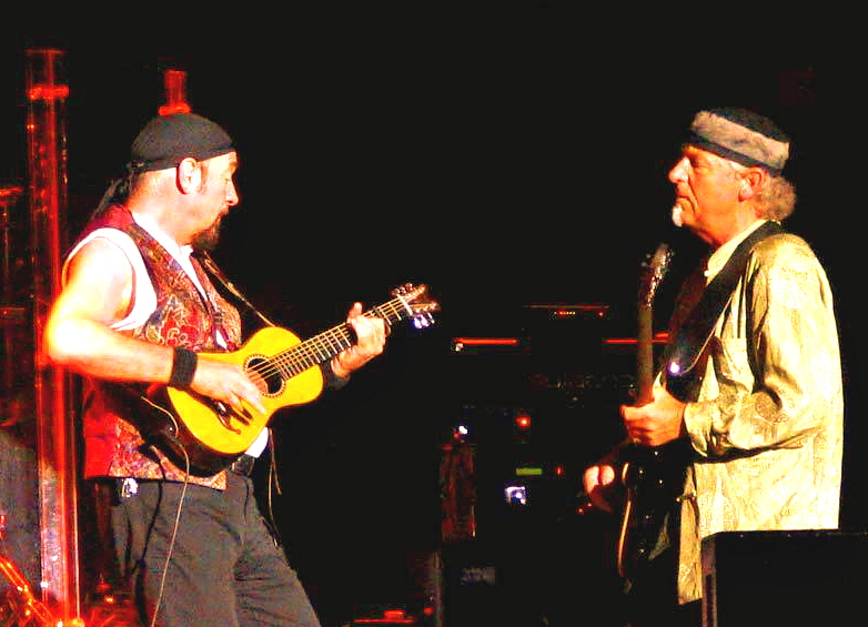 Gemaakt op 5 mei in het Teatro Nazionale, Milaan, Italië.